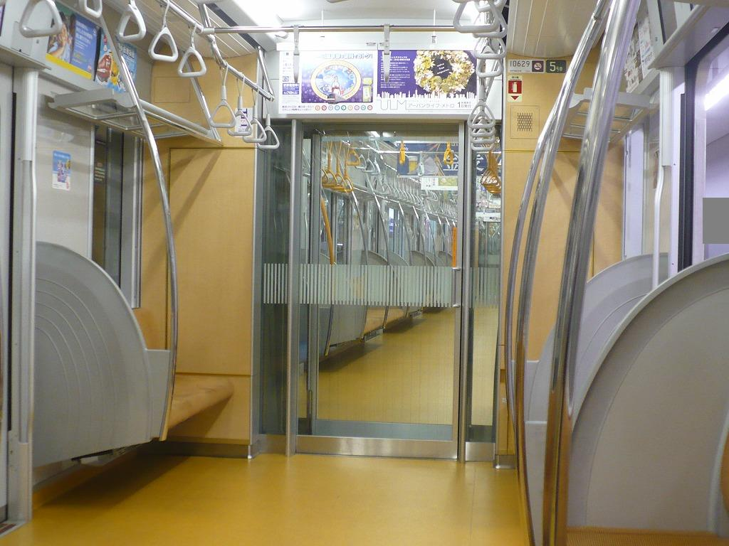 東京メトロ10000計車内